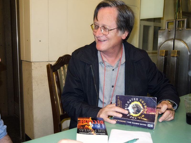 Konvencija Kontakt, koja je spojila 34. SFeraKon i 34. Eurocon u Zagrebu